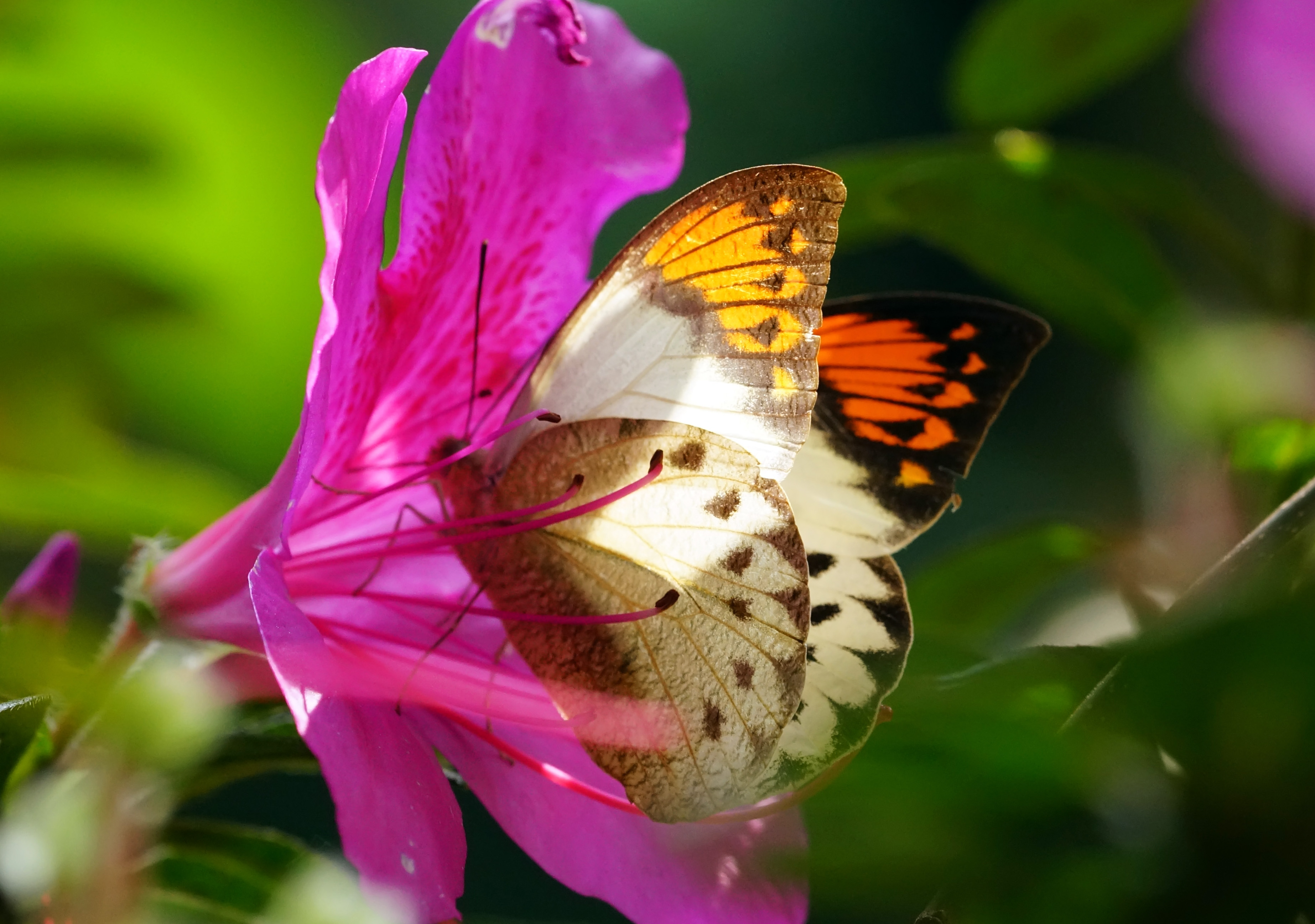 橙端粉蝶 Hebomoia glaucippe formosana